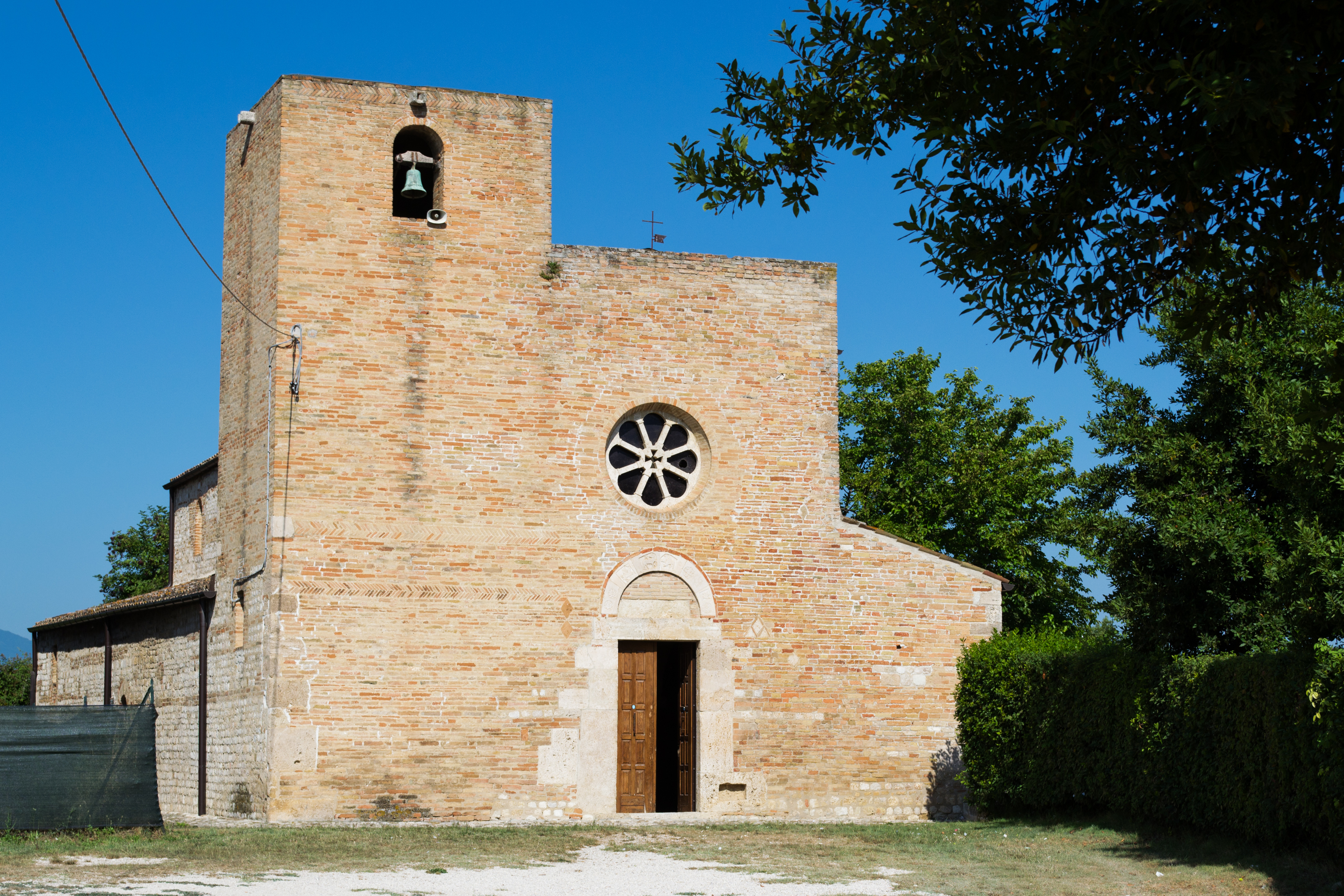 Chiesa di Santa Maria a Vico, nel comune di Sant'Omero (TE)